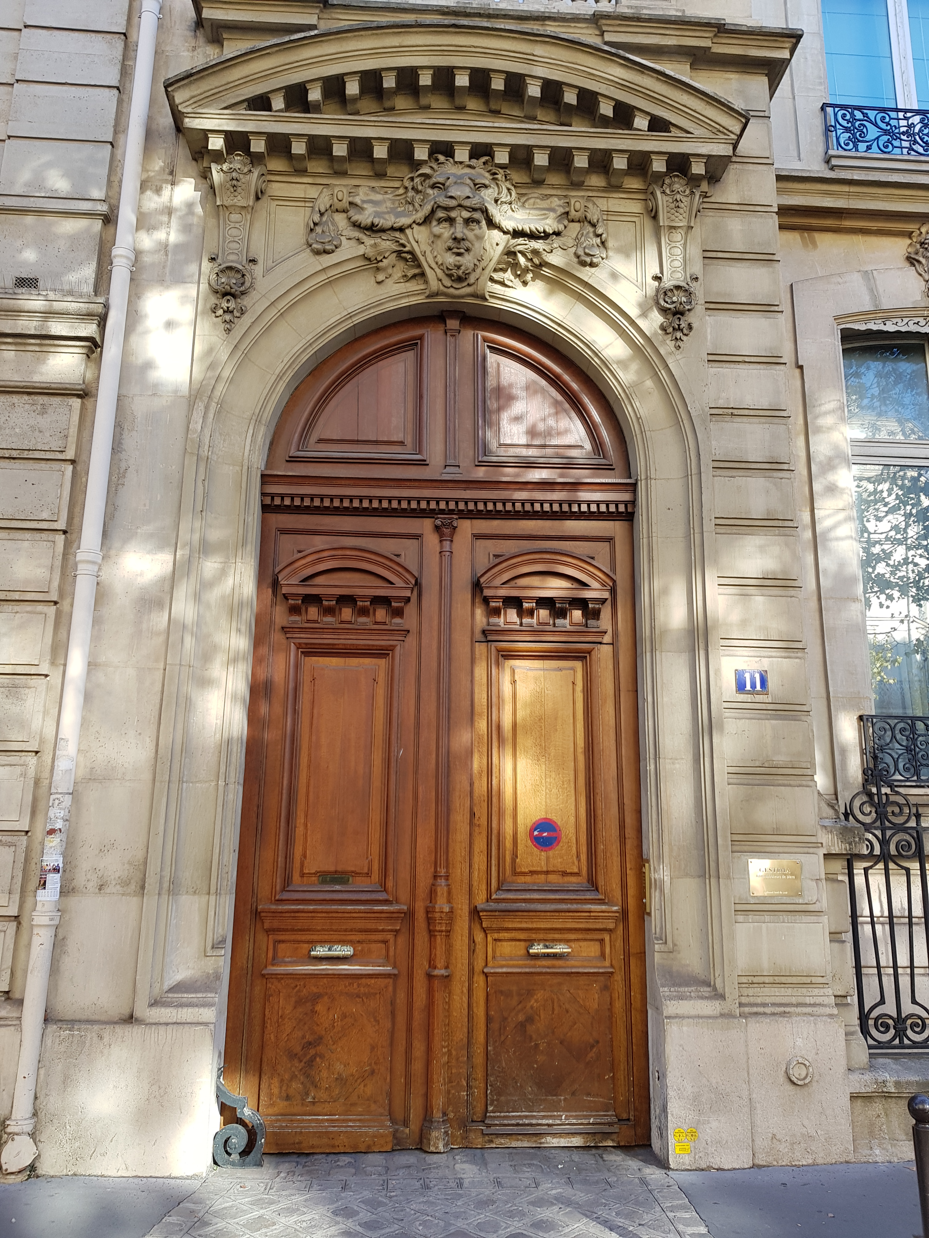 11, boulevard de La Tour-Maubourg, Paris 7e.